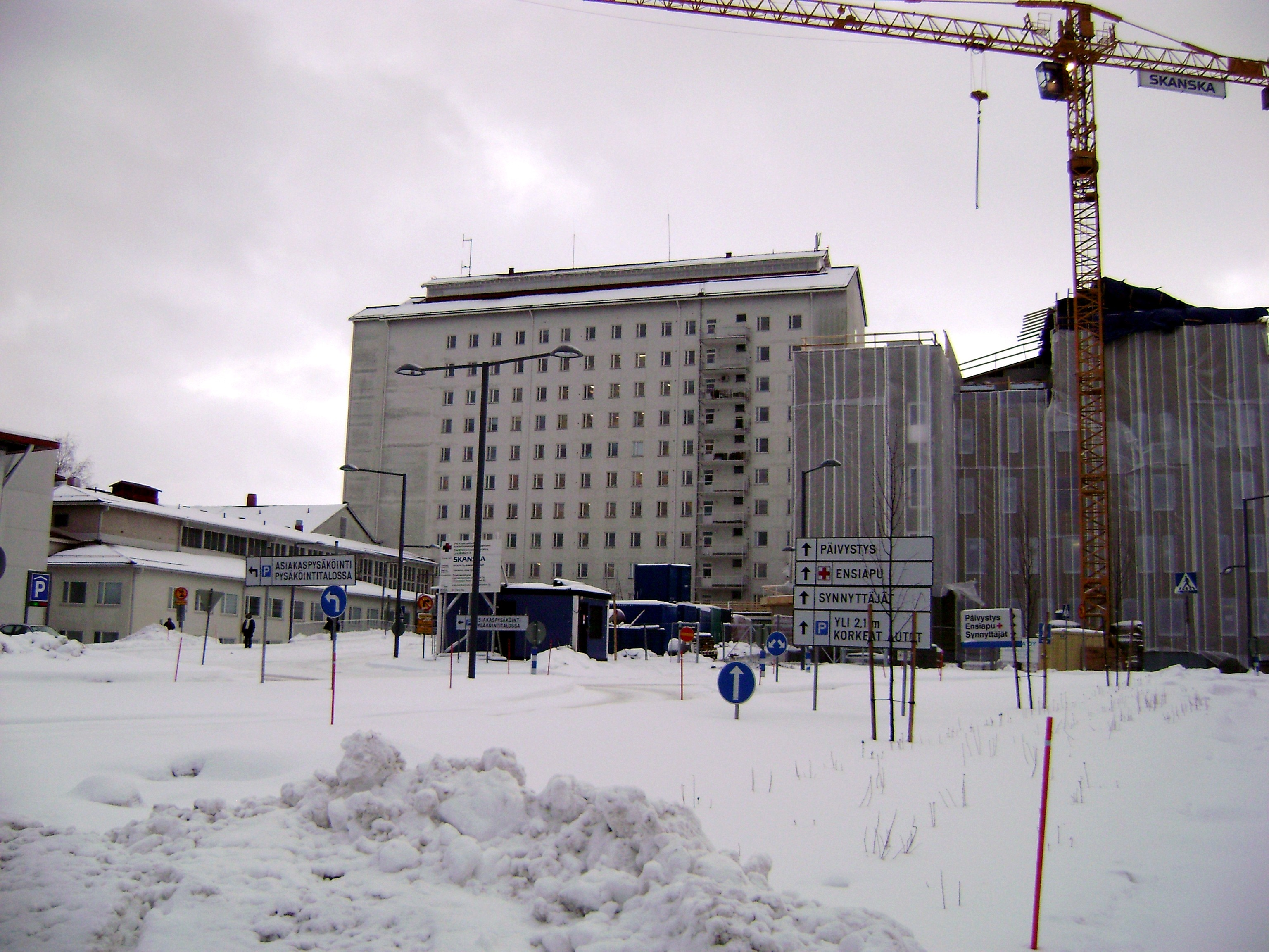 Pohjois-Karjalan keskussairaala Joensuussa.